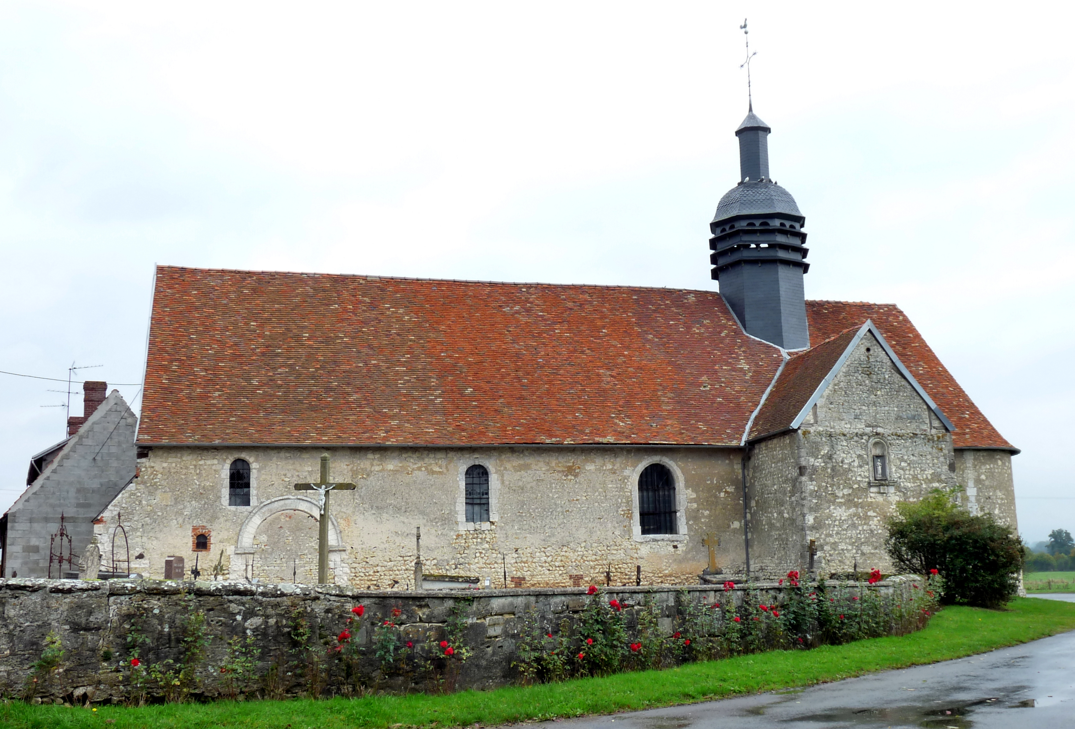 Eglise Notre-Dame d'Hodenger .